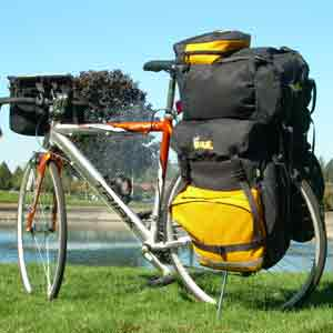 Cicloaventura no Oregon, US